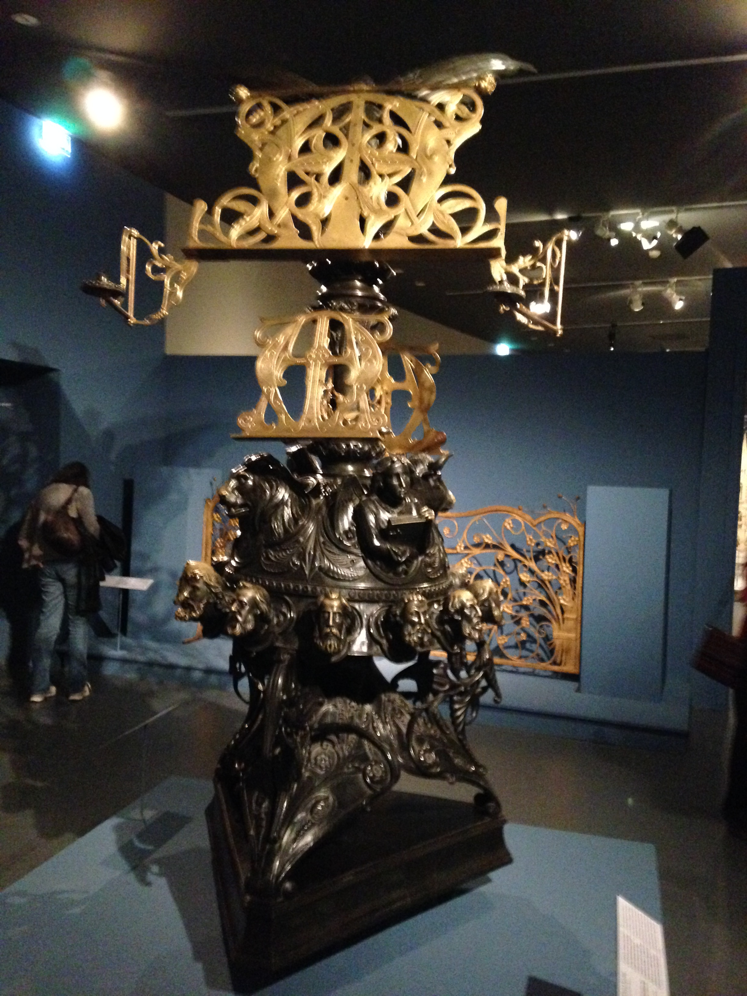 Grand lutrin de Notre-Dame (1868) de Placide Poussielgue-Rusand (1824-1889) sur un dessin d'Eugène Viollet-le-Duc. Vue d'ensemble. Orfèvrerie, bronze et fer doré. Classé monument historique le 16 mai 1980. Elément du Trésor de Notre-Dame ùontréà la Cité de l'architecture pour l'expo sur Viollet-le-Duc.